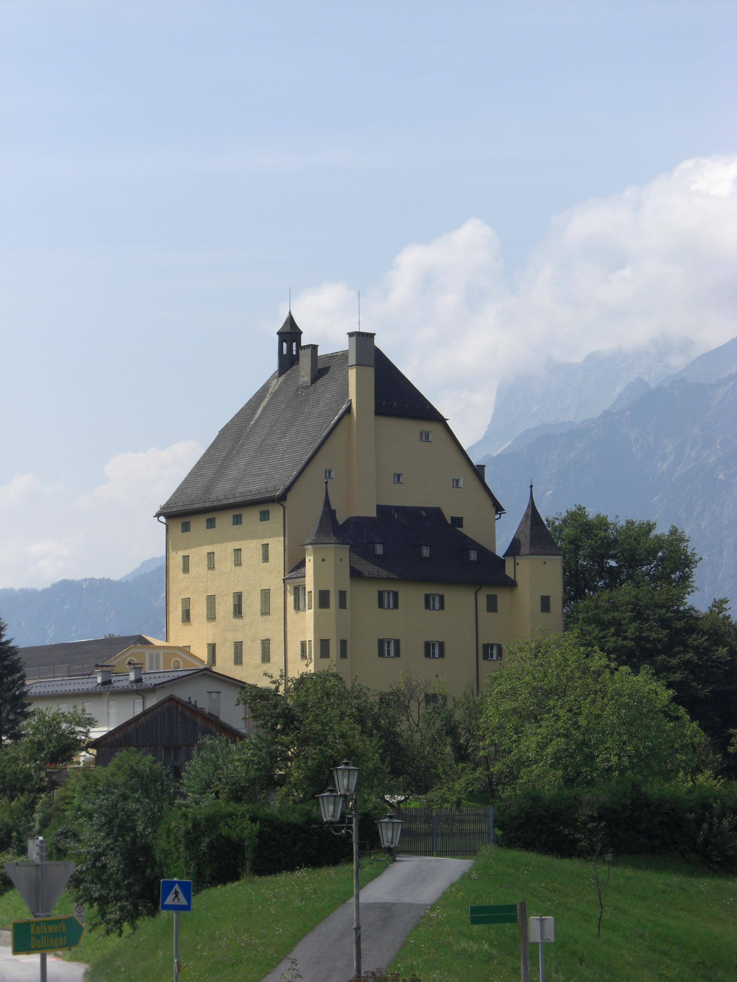 Ansitz Goldenstein